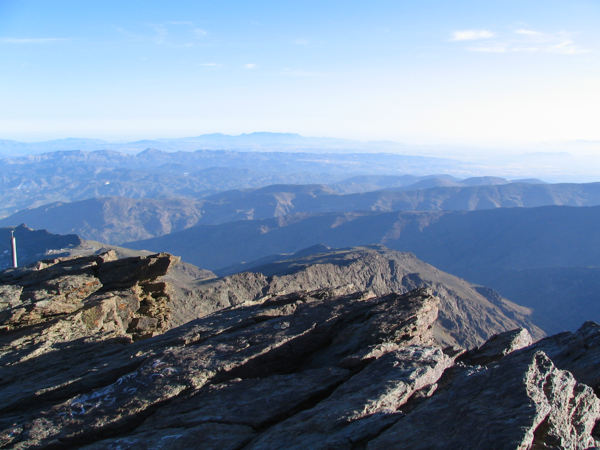 Gipfelblick vom Pico del Veleta in der Sierra Nevada